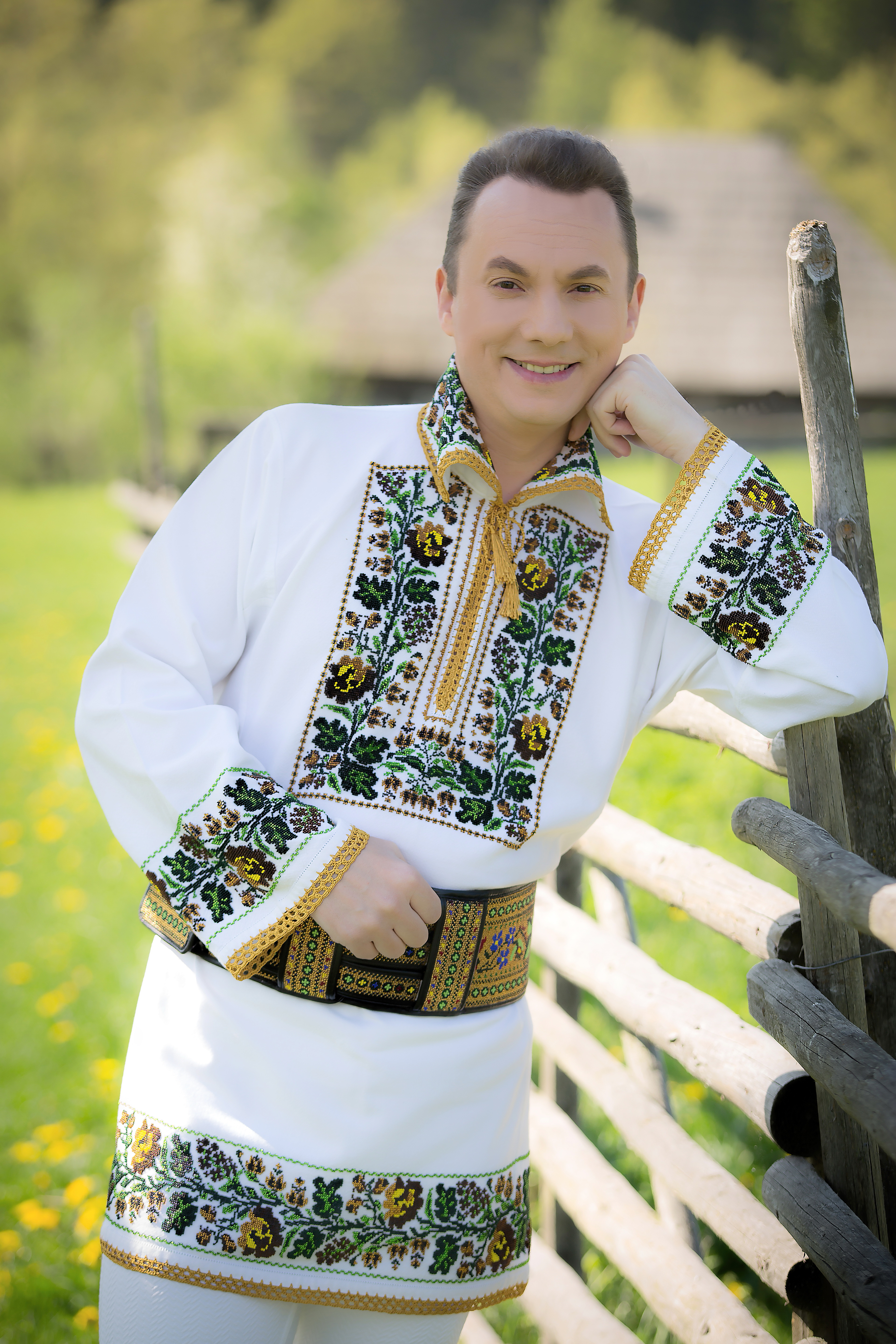 Marius Zgâianu - interpret muzică populară